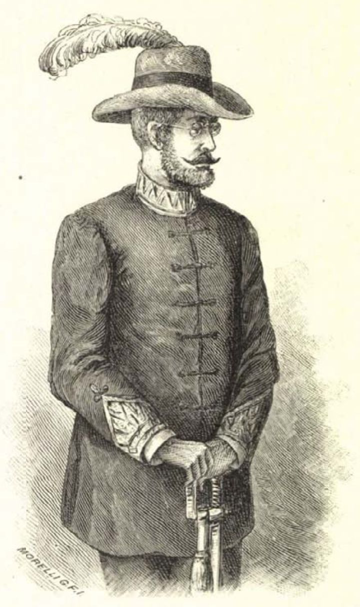 Görgei Arthur tábornok 1849-ben. A táborban készített egykorú rajz után készítette Morelli Gusztáv